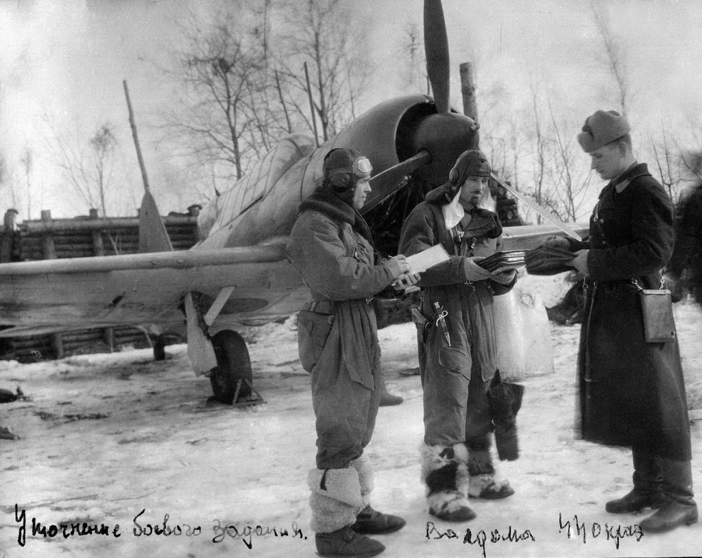 Уточнение боевого задания, Валдома, 44-я отдельная корректировочная авиационная эскадрилья (44 окраэ)